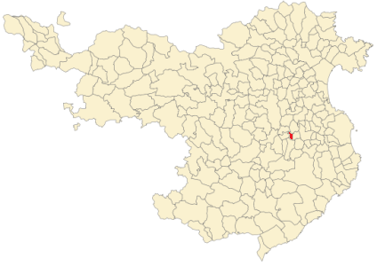 Situación de Sant Joan de Mollet en la provincia de Gerona.